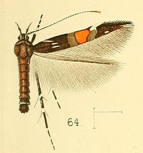 Cosmopterix cognita